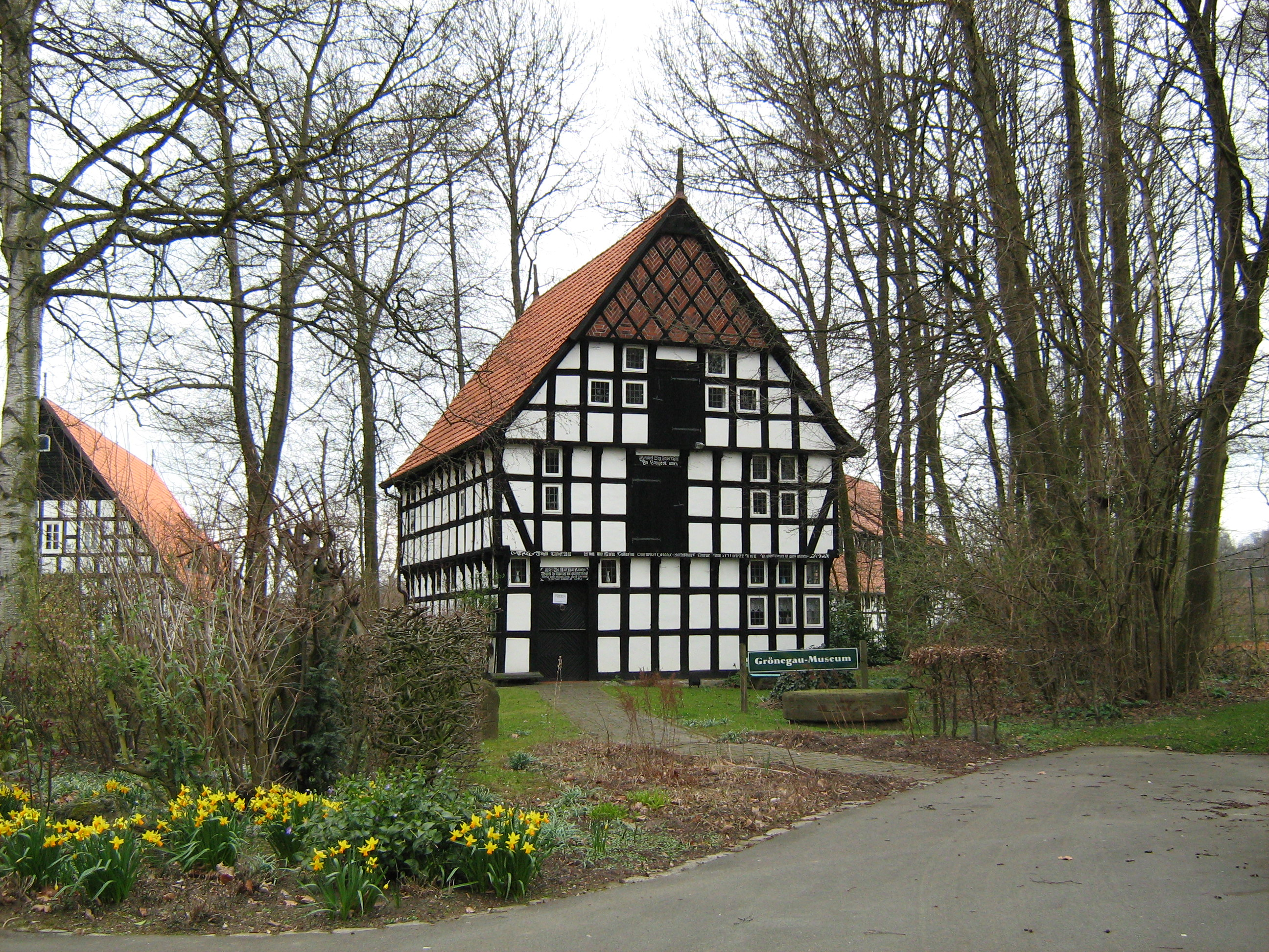 Grönegaumuseum (kl. Haus) Melle 2008